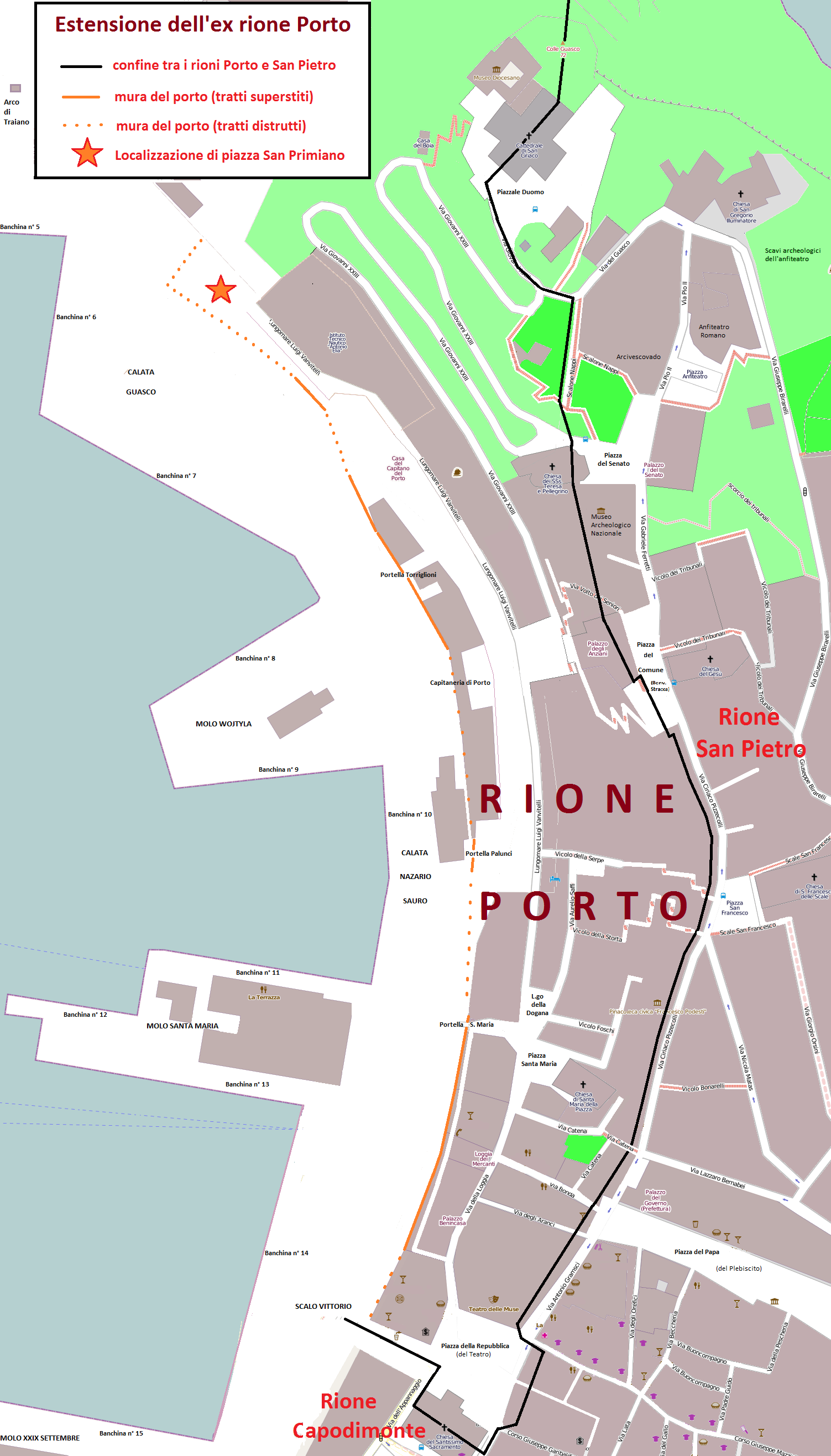 Mappa dell'ex rione Porto di Ancona (ora confluito nel rione San Pietro), con i confini, le vie, le piazze e i parchi.